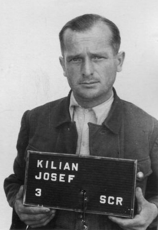 Haftbogenfoto des Angeklagten Josef Kilian (17.06.1910 in Nürnberg - 05.07.1984 in Frankfurt am Main), Kapo und Lagerhenker im Konzentrationslager Mittelbau-Dora, im Dachauer Dora-Prozess ("Case No. 000-50-37 Dora") am 30.12.1947 zu lebenslanger Haft verurteilt.